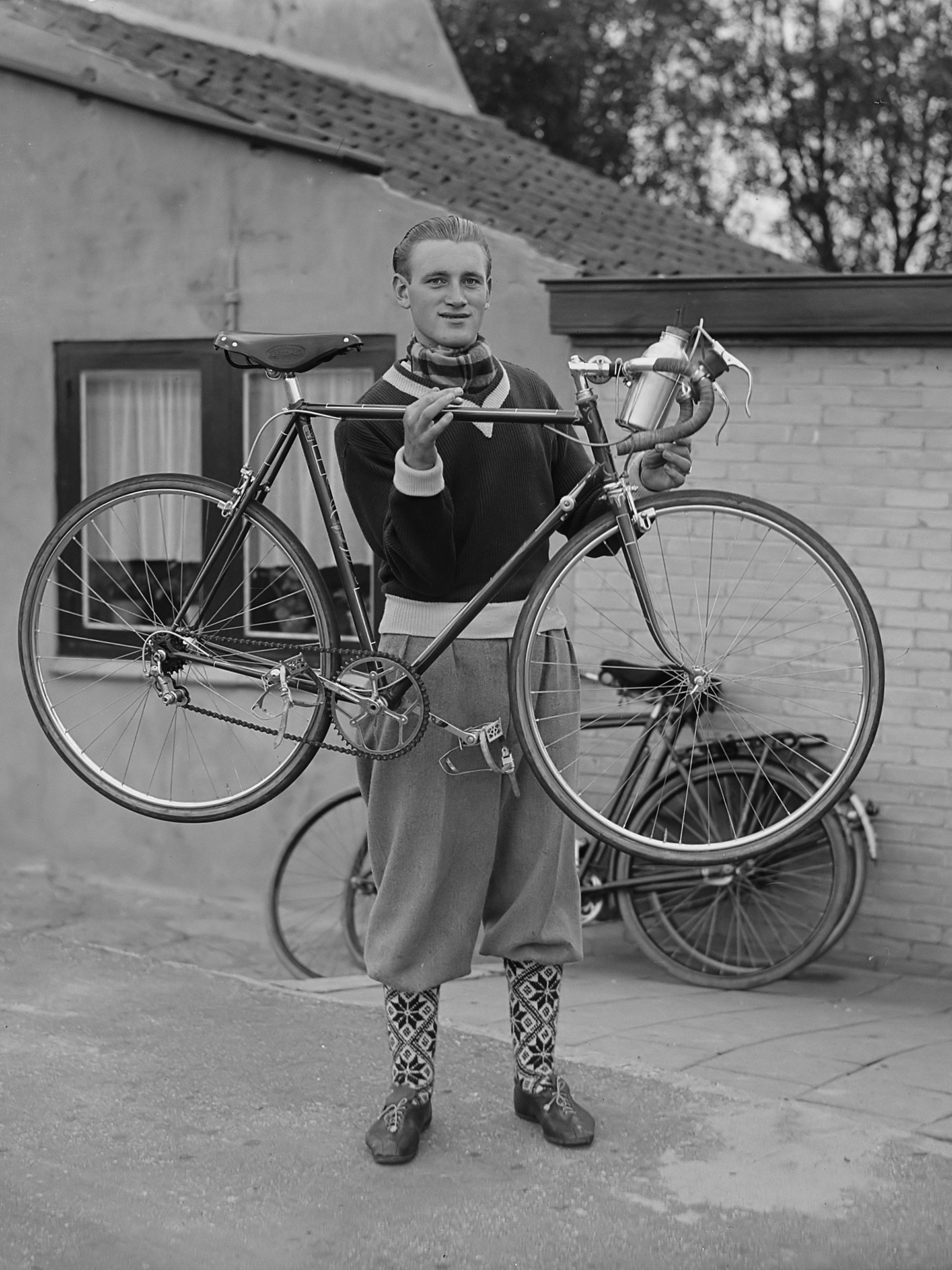 Kees Broekman per fiets naar Noorwegen 19 september 1949